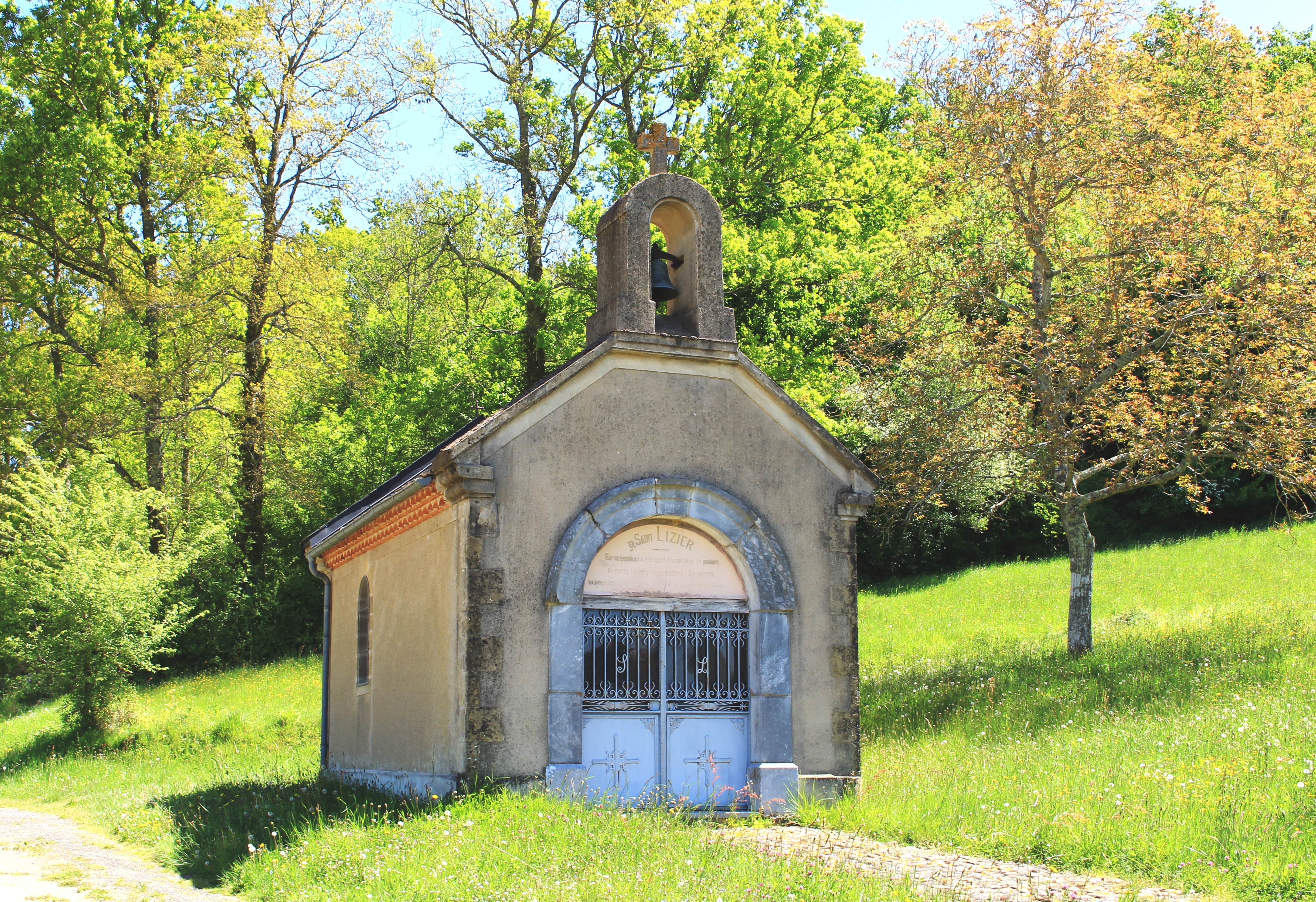 Chapelle Saint-Lizier de Tournous-Darré (Hautes-Pyrénées)